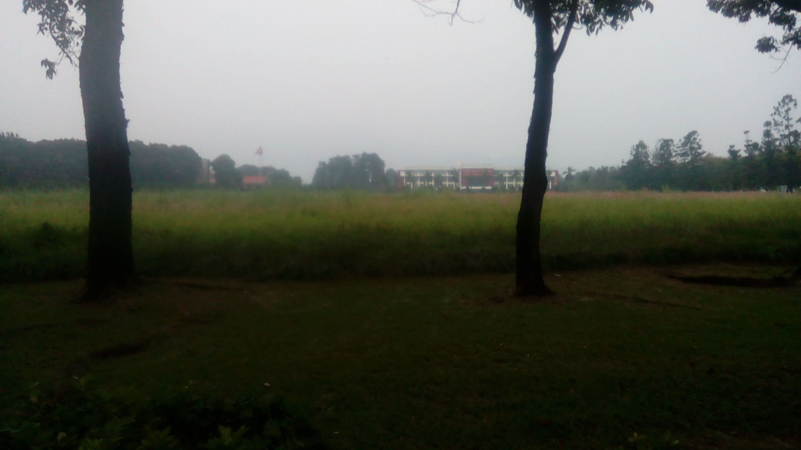 遠處為行政大樓。